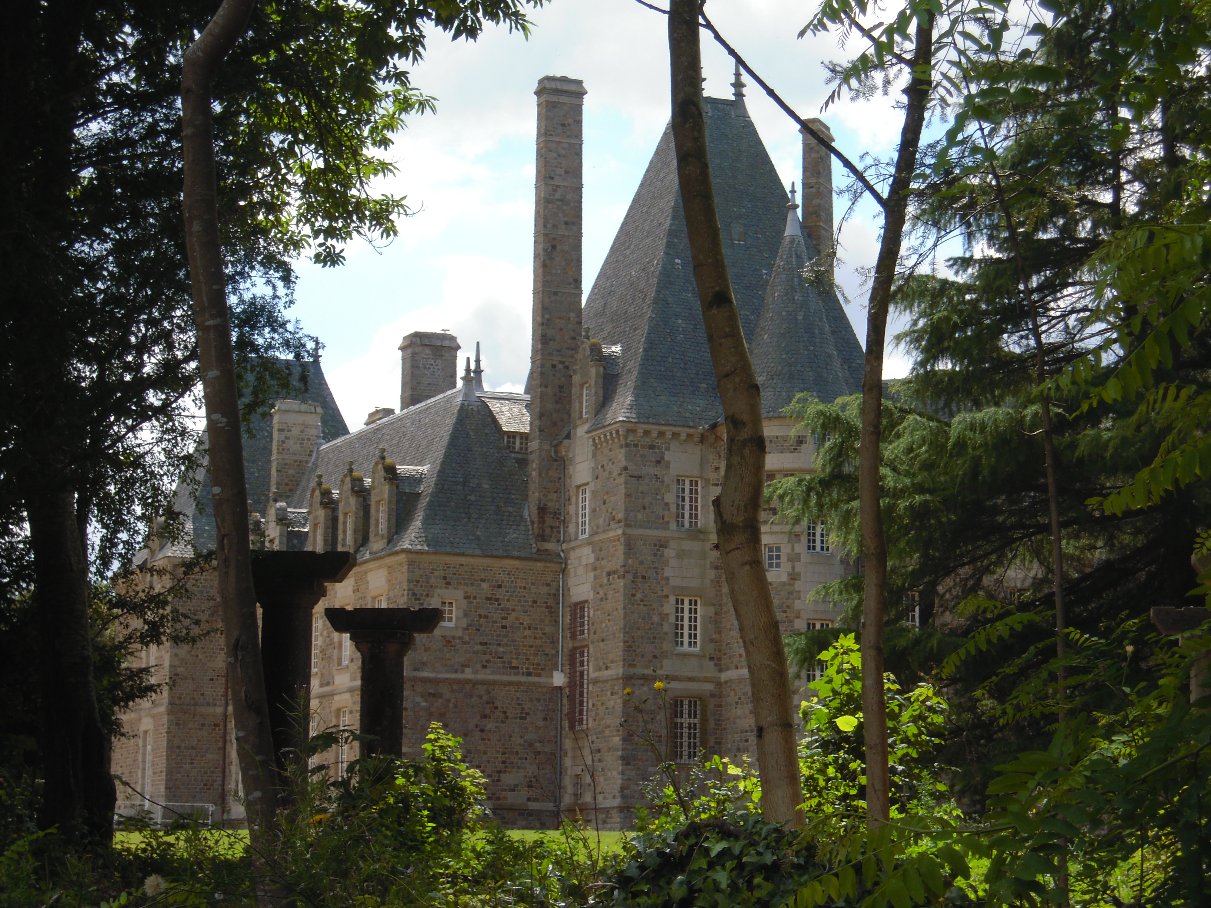 Château de Bel-Air .